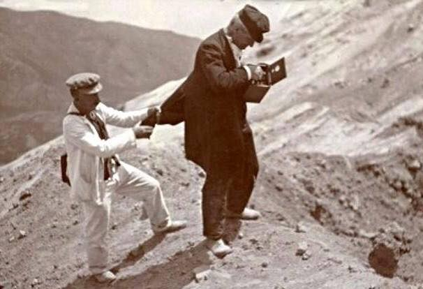 Giuseppe Mercalli in cima al Vesuvio nel 1909. Si fa trattenere da un accompagnatore probabilmente a causa delle raffiche di vento.